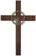 Cruz de la Escuela Cientifica Basilio